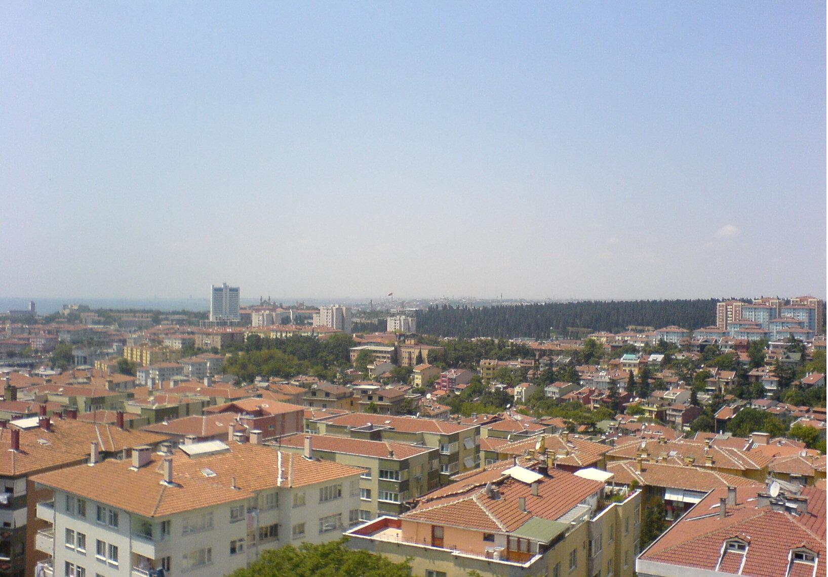 Lisans